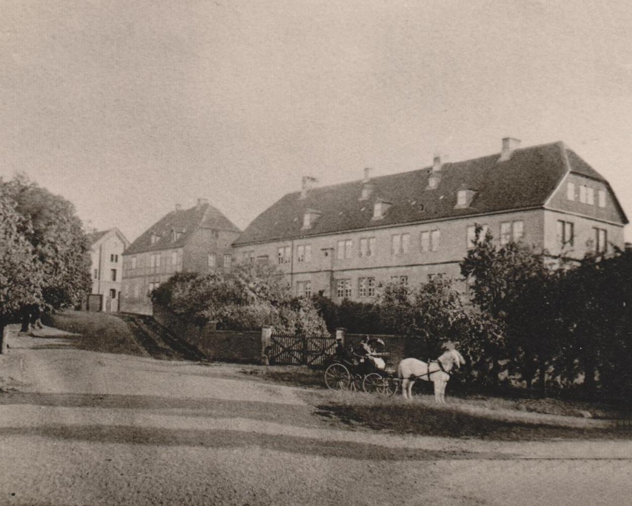 Das Schloss Coldingen (zirka 1900) wurde bis Mitte des 19. Jahrhunderts als Amtssitz genutzt.